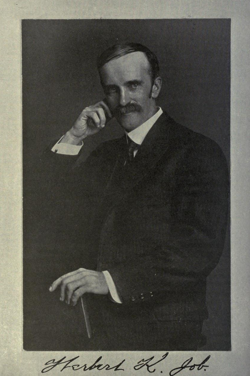 Herbert K. Job